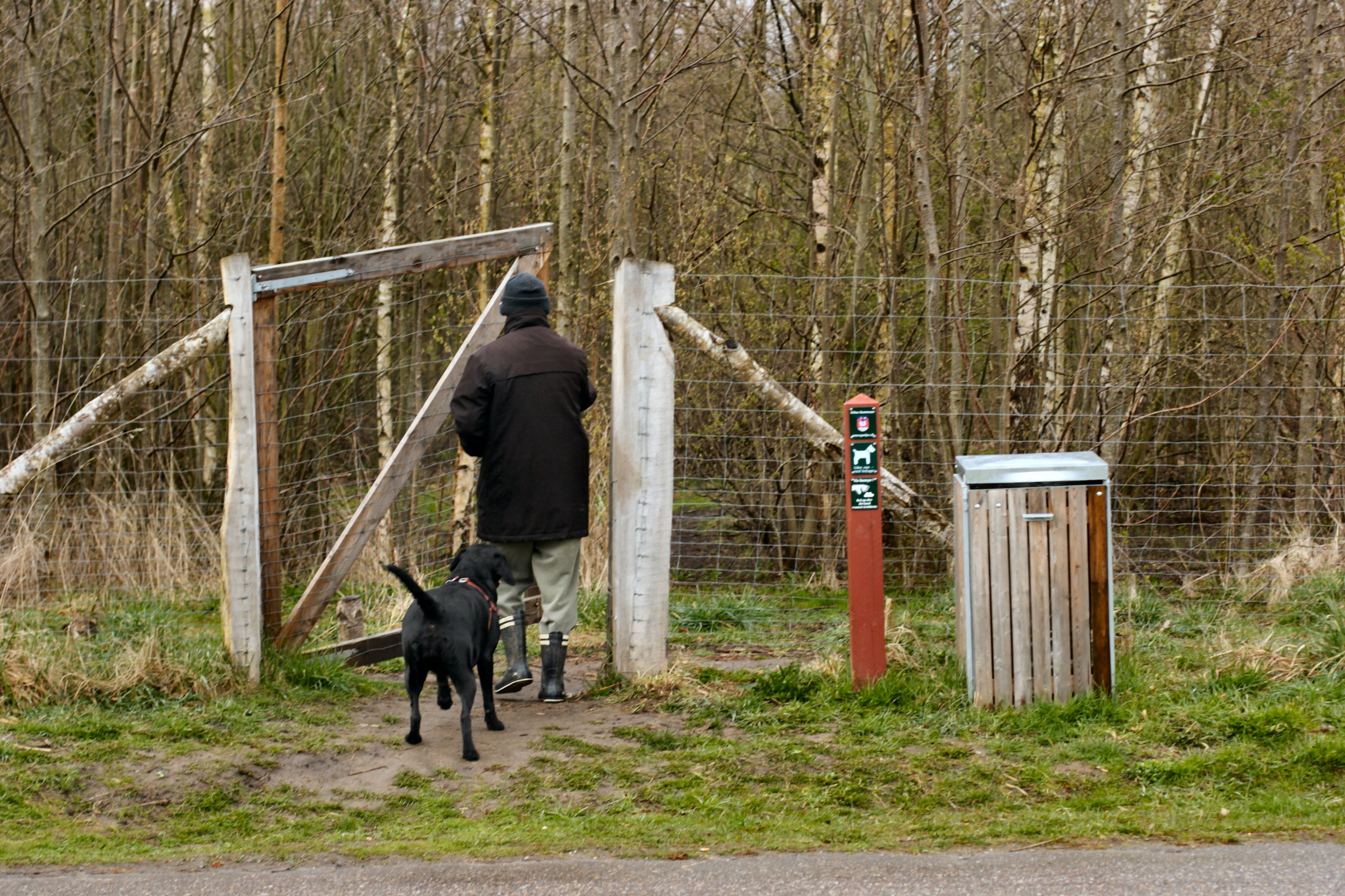 Mand og hund på vej ind i hundeskoven i Mollerup Skov ved Aarhus